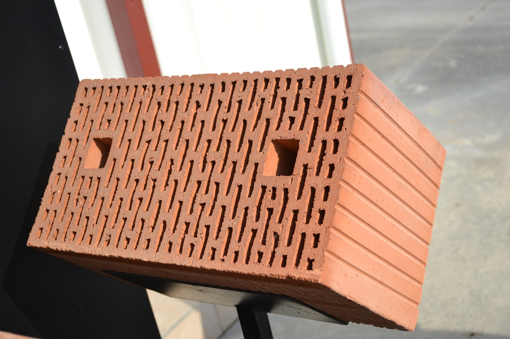 Cărămidă EC 44 SUPER TH